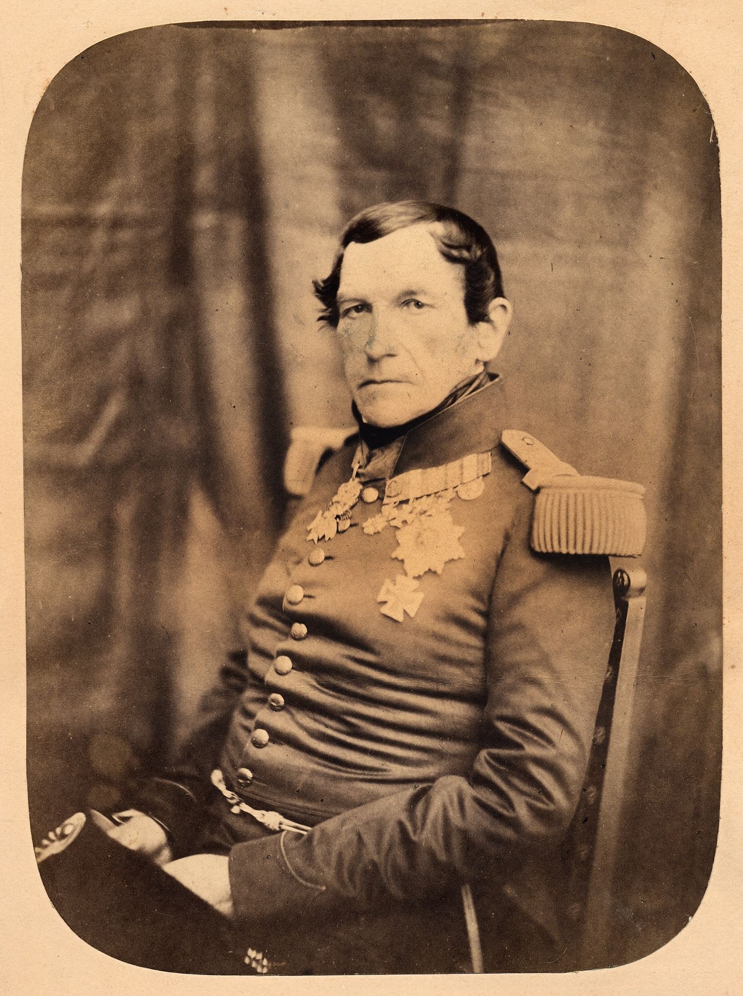 Leopold I van België (1790-1865)